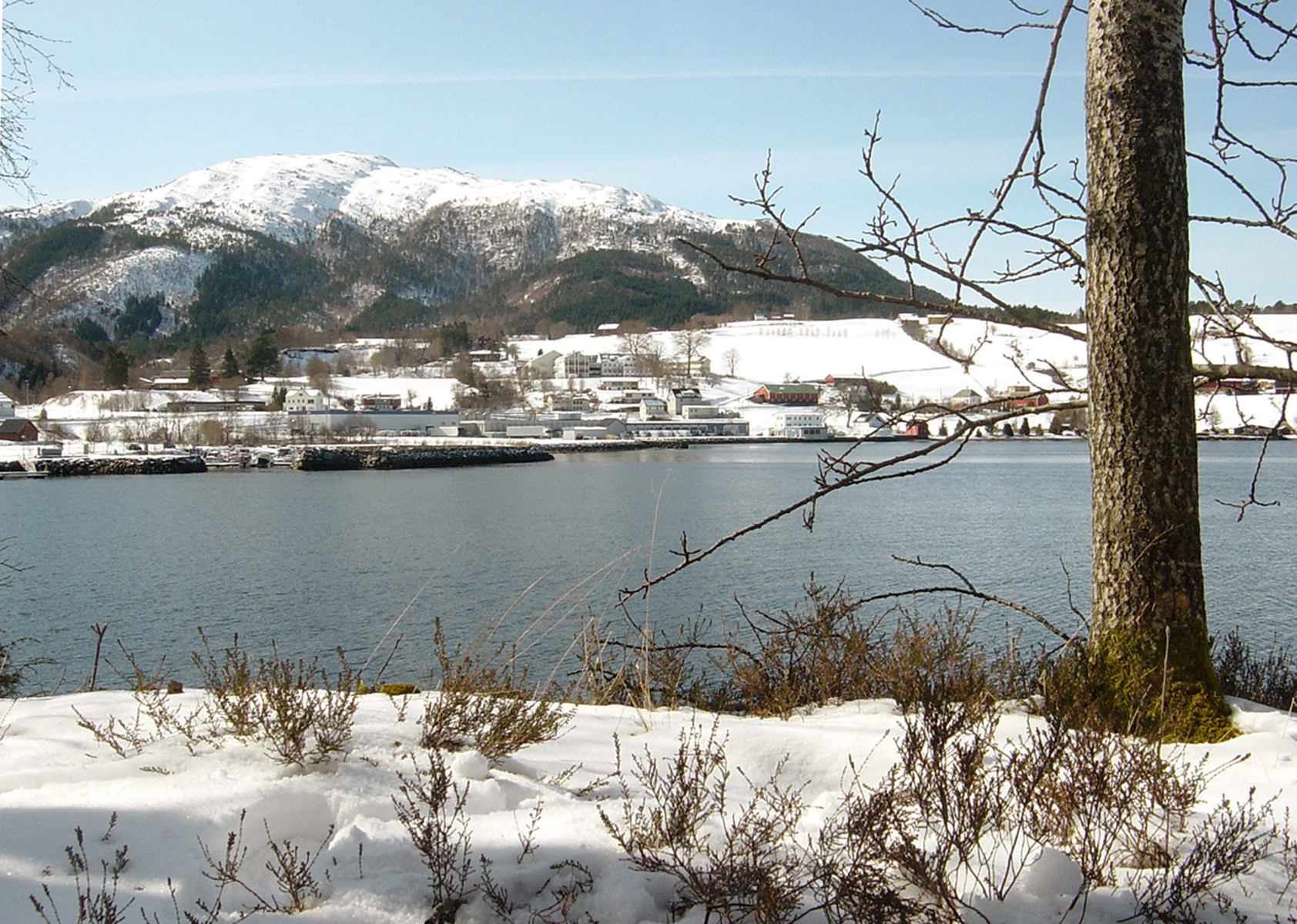 Gjemnes and Torvikbukt